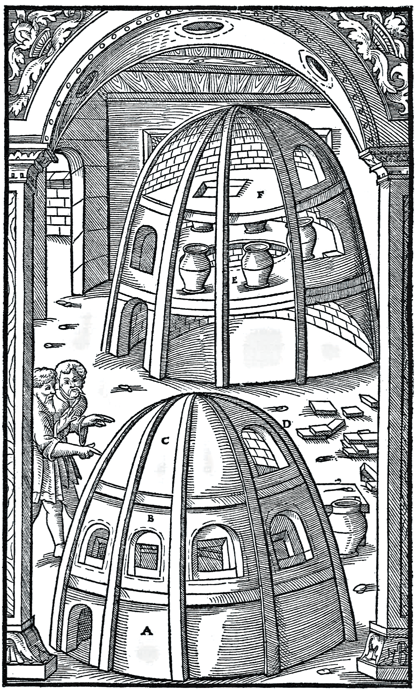 Georg Agricola, Zwölf Bücher vom Berg- und Hüttenwesen, übers. v. Carl Schiffner, Berlin 1928, S. 502 ff. Scanned by Bibliothek für Sozial- und Wirtschaftsgeschichte / Köln, rights released to the public domain. caption:"Die untere Kammer eines anderen zweiten Ofens A. Die mittlere Kammer B. Die oberste Kammer C; deren Fenster D. Die runde Öffnung E. Die viereckige Öffnung F."